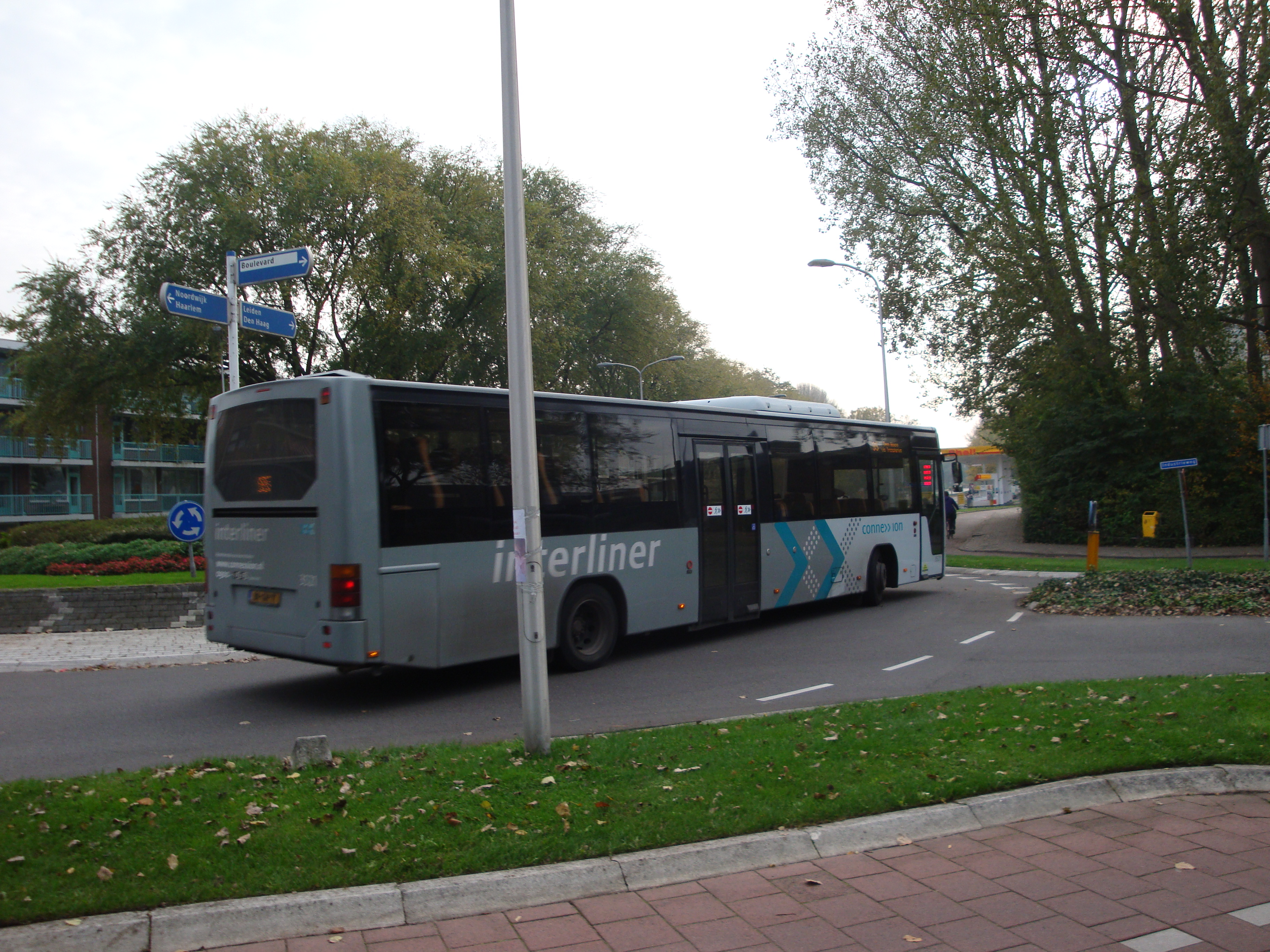 Interliner 95 op rotonde bij Industrieweg Katwijk.